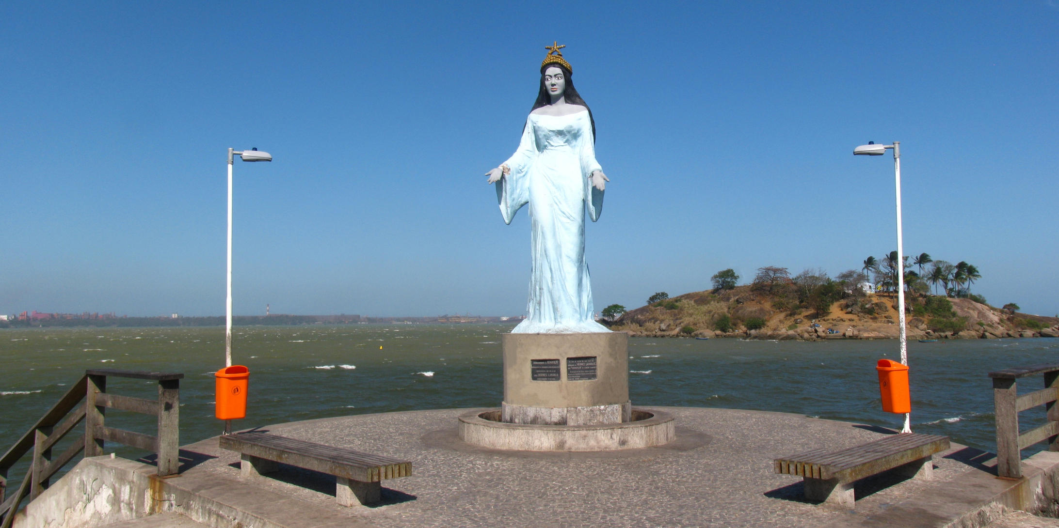 Molhe de Iemanjá na Praia do Canto, Vitória, ES.